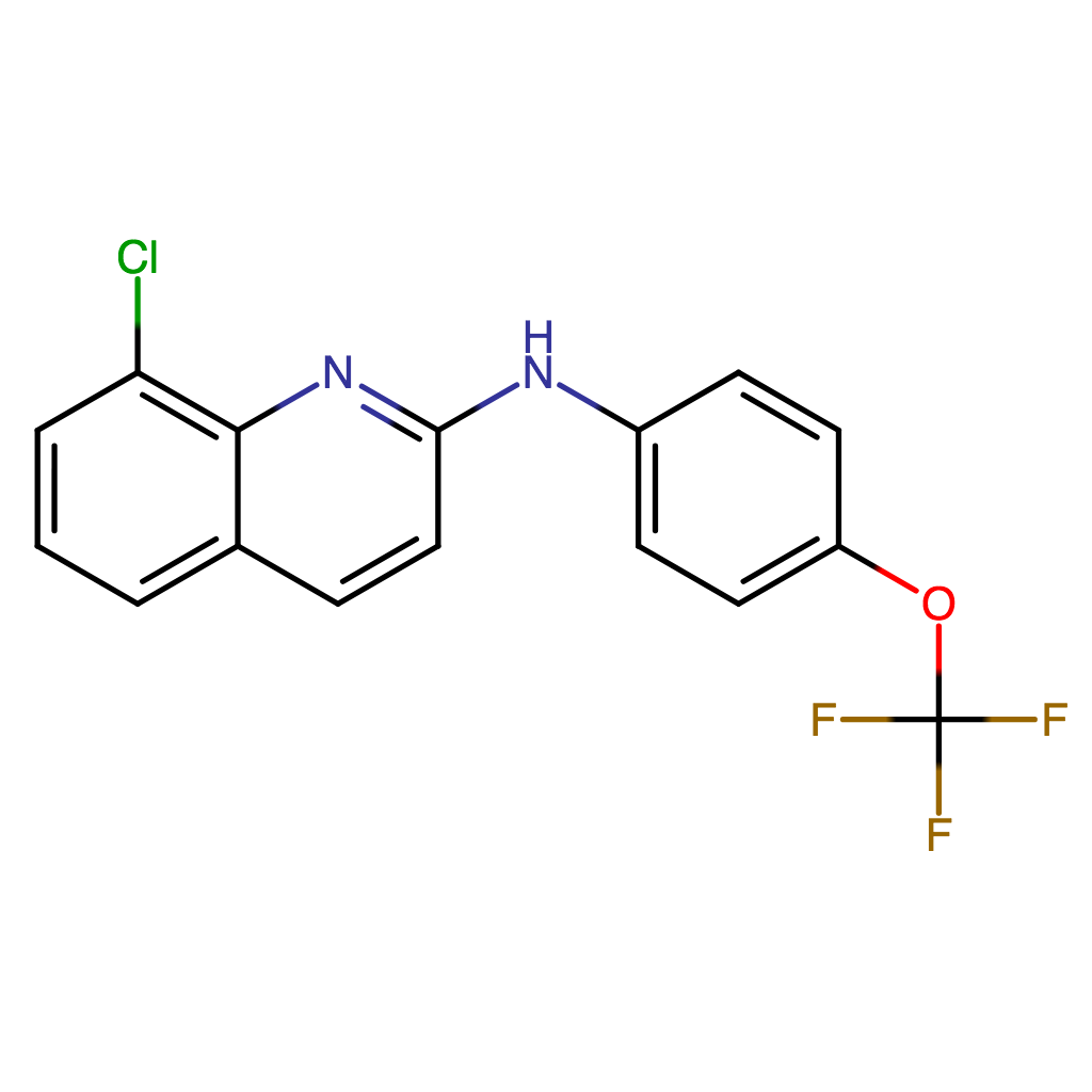 La molécule ABX 464